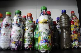 Ladrillos ecológicos , hechos de botellas plásticas y envolturas